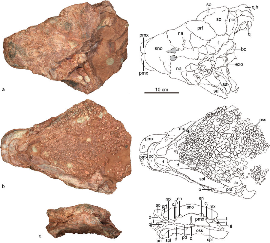 The skull and mandible of Jinyunpelta sinensis holotype ZMNH M8960. Photograph and line drawing of the skull and mandible in dorsal (a), ventral (b), and anterior (c) views. Abbreviations: an, angular; ar, articular; b, paranasal aperture B; bo, basioccipital; c1, paranasal aperture C1; c2, paranasal aperture C2; d, dentary; en, external naris; exo, exoccipital; f, frontal; fen, fenestra; l, lacrimal; mso, middle supraorbital; mx, maxilla; mf, maxillary fossa; na, nasal; o, orbit; oss, ossicle; pd, predentary; pmx, premaxilla; po, postorbital; pra, prearticular; prf, prefrontal; q, quadrate; qj, quadratojugal; qjh, quadratojugal horn; sa, surangular; sno, supranarial ornamentation; spl, splenial; sq, squamosal.